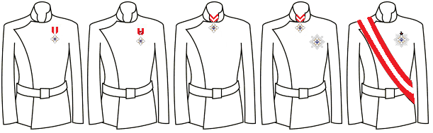 Modo di indossare le decorazioni dell'Ordine della Corona d'Italia (Regno d'Italia)